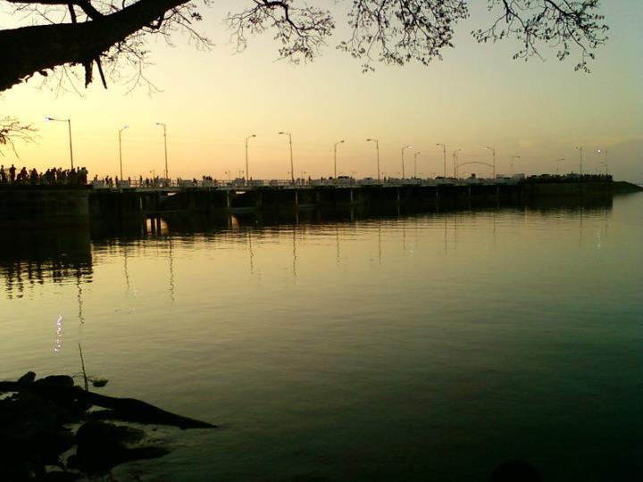 Atardecer en la Represa de Calabozo